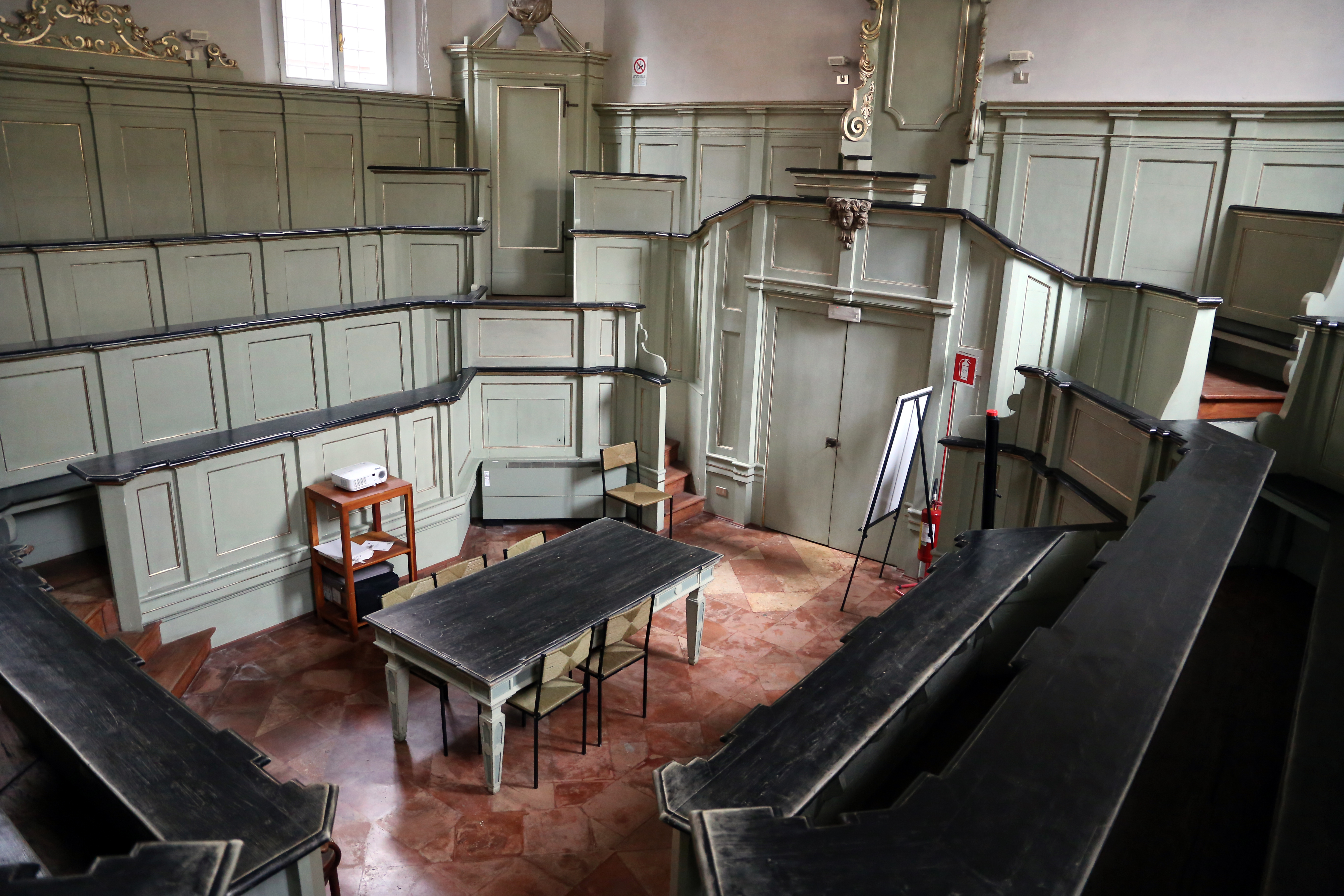 Palazzo Paradiso This is a photo of a monument which is part of cultural heritage of Italy.